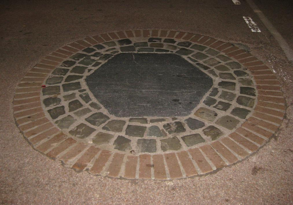 Blauwe Steen in Leiden, Nederland